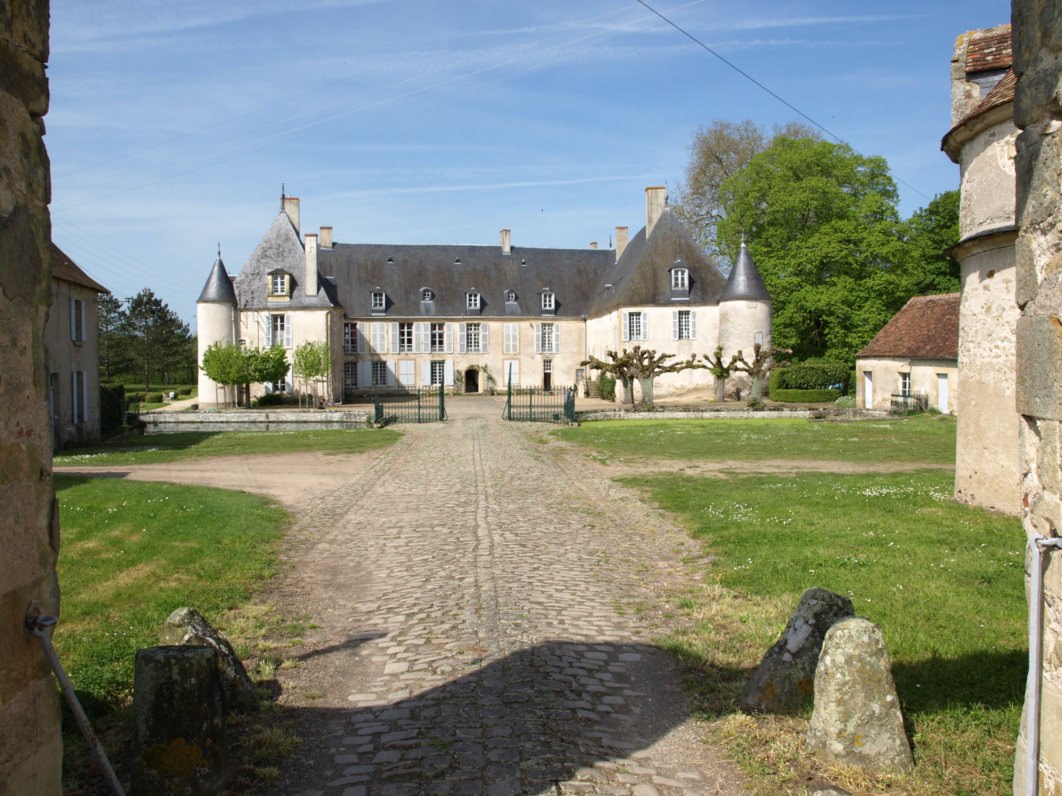 Chateau d'Autry